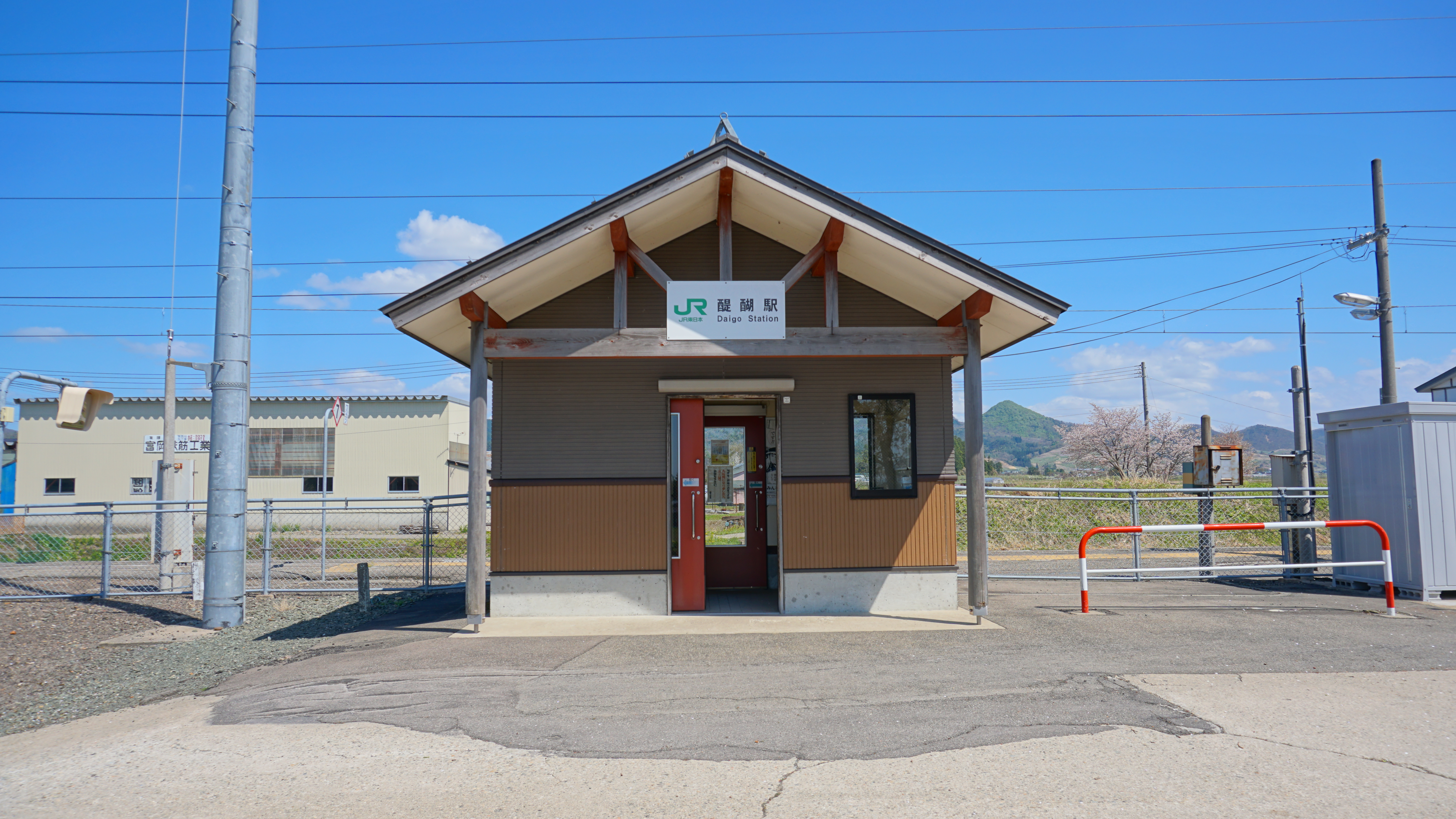 奥羽本線・醍醐駅（秋田県横手市）